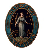 Wappen der Stadt Agnetheln- Agnita- Romania-Rumänien. Seit der Gründung der Stadt durch die Siebenbürger Sachsen wurde dieses Wappen offiziell verwendet. Nach 1990 wurde von der primarie Agnita ohne Grund ein anderes, erfundenes Wappen, als Wappen der Stadt Agnita auf Wikipedia, veröffentlicht. Dieses illegale Vorgehen der primaria Agnita widerspricht jedewelcher Ethik oder sogar Kultur bzw. Heraldik-Ordnung. Die europäische Heraldik-Gesetzesordnung besagt, daß ein altes, offiziell seit jahrhunderten anerkanntes und in Gebrauch befindliches Wappen nicht vernichtet werden kann oder sogar gegen ein neues Wappen ausgetauscht werden darf.